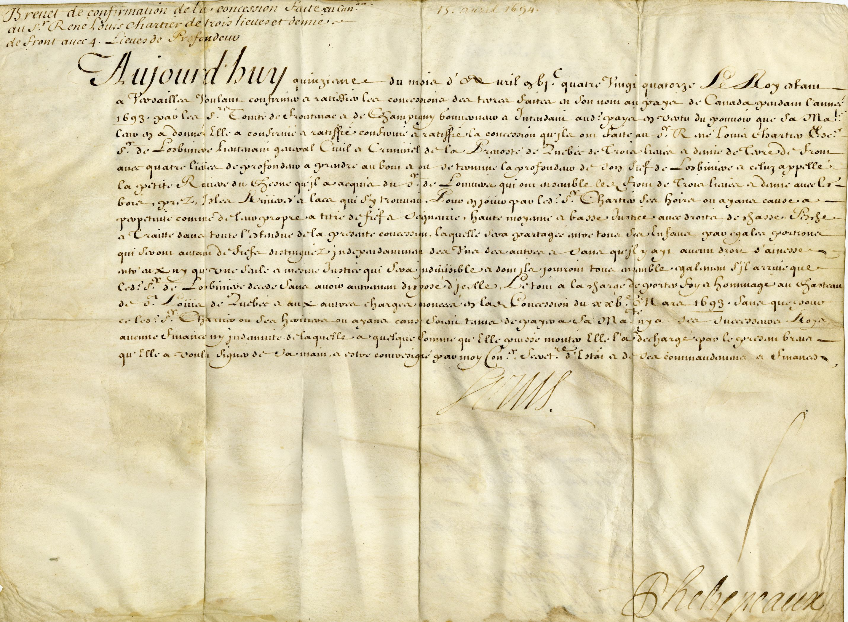 Brevet de confirmation d’une concession en Canada par le Roi à René-Louis Chartier de Lotbinière, 15 avril 1694 « BAnQ a récemment acquis un document signé de la main du roi Louis XIV qui s’ajoute aux rares documents de cette époque. Il s’agit de la confirmation de la concession faite « en Canada » à René-Louis Chartier des terres qui formeront la seigneurie de Lotbinière. » – BAnQ